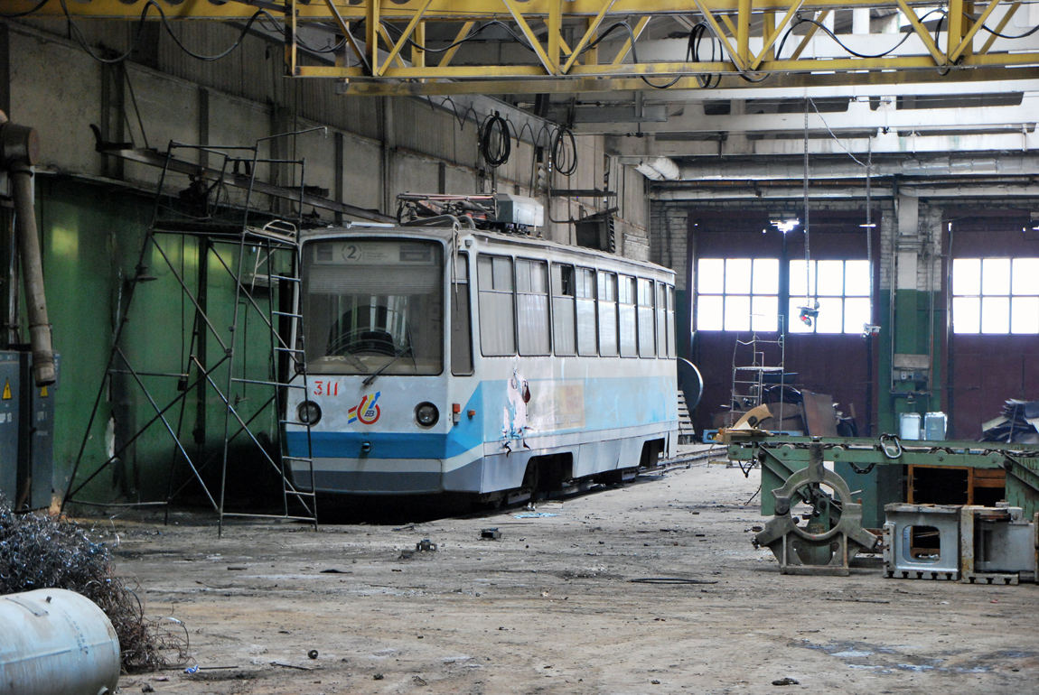 Вагон №311 после закрытия трамвайного движения стоит в боксах депо №3.